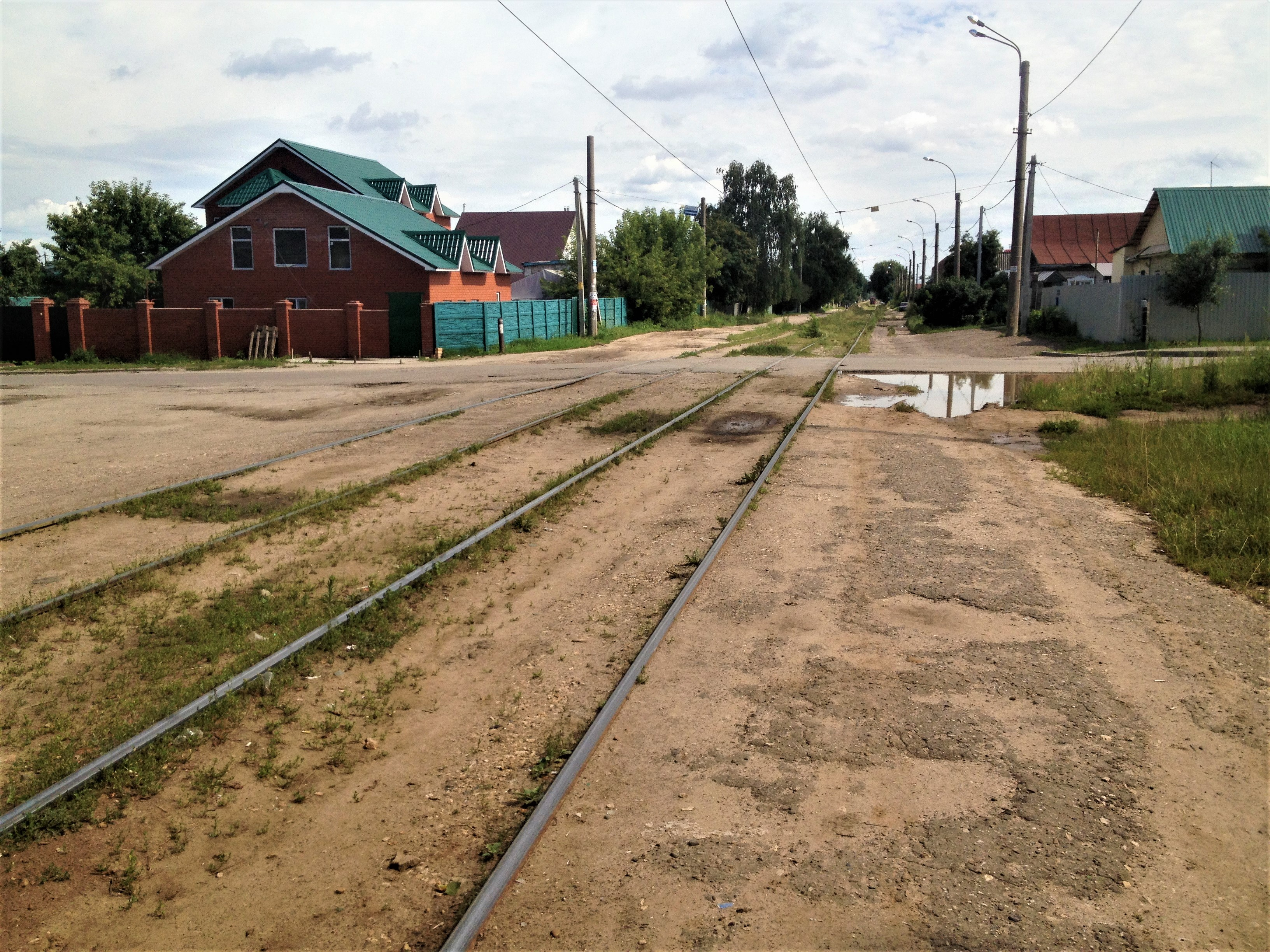 Пересечение улиц Айдарова и Кутузова (г. Казань).